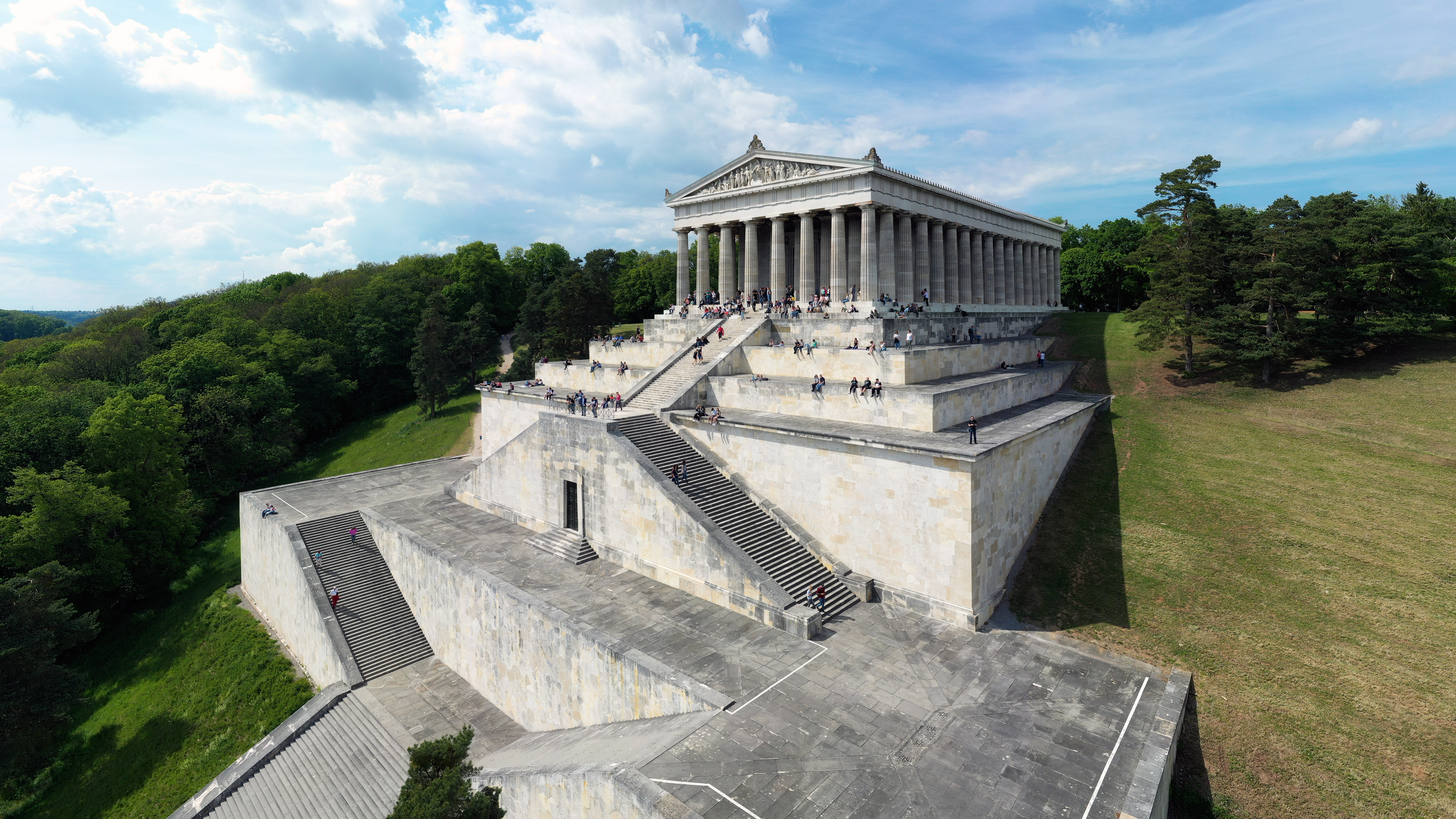 Walhalla Gedenkstätte in Donaustauf bei Regensburg This is a photograph of an architectural monument.